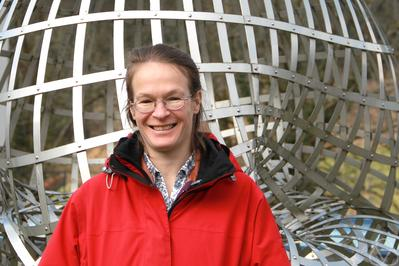 Mireille Bousquet-Mélou à Oberwolfach 2014